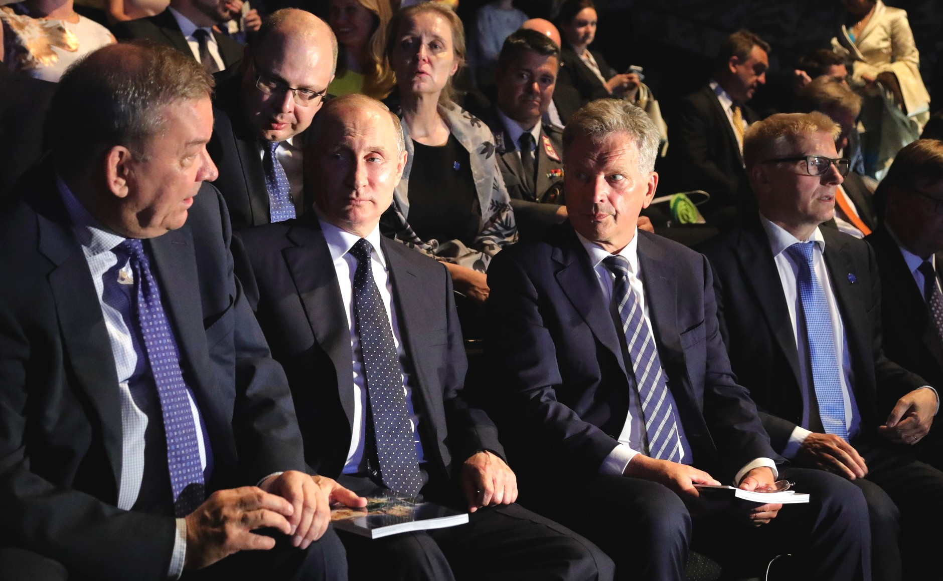 Президент России Владимир Путин с генеральным директором Государственного академического Большого театра Владимиром Уриным (слева) и Президентом Финляндии Саули Ниинистё на опере «Иоланта» в замке Олавинлинна. Савонлинна, замок Олавинлинна